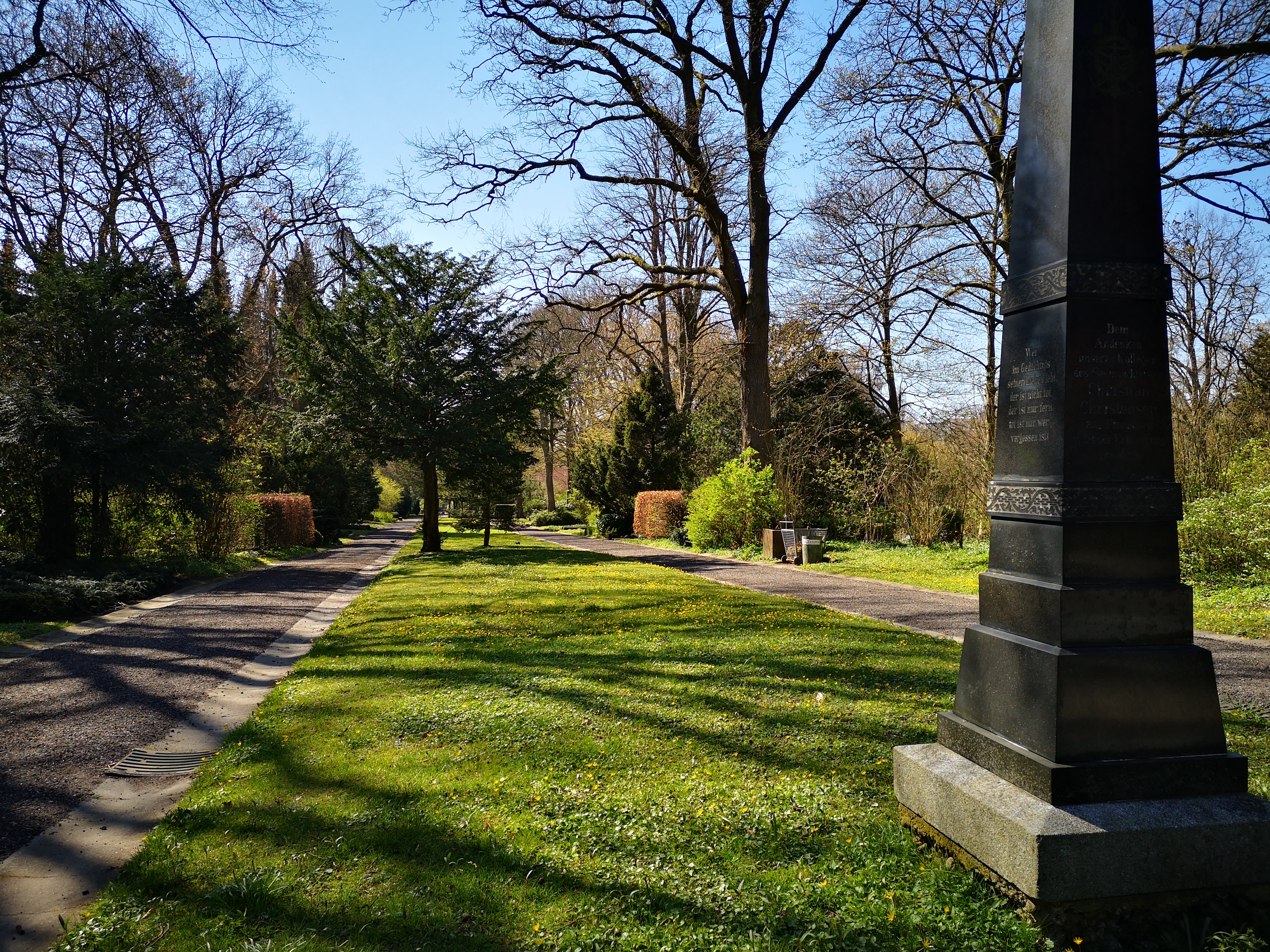 Mühlenfriedhof bei der Stele (2019)